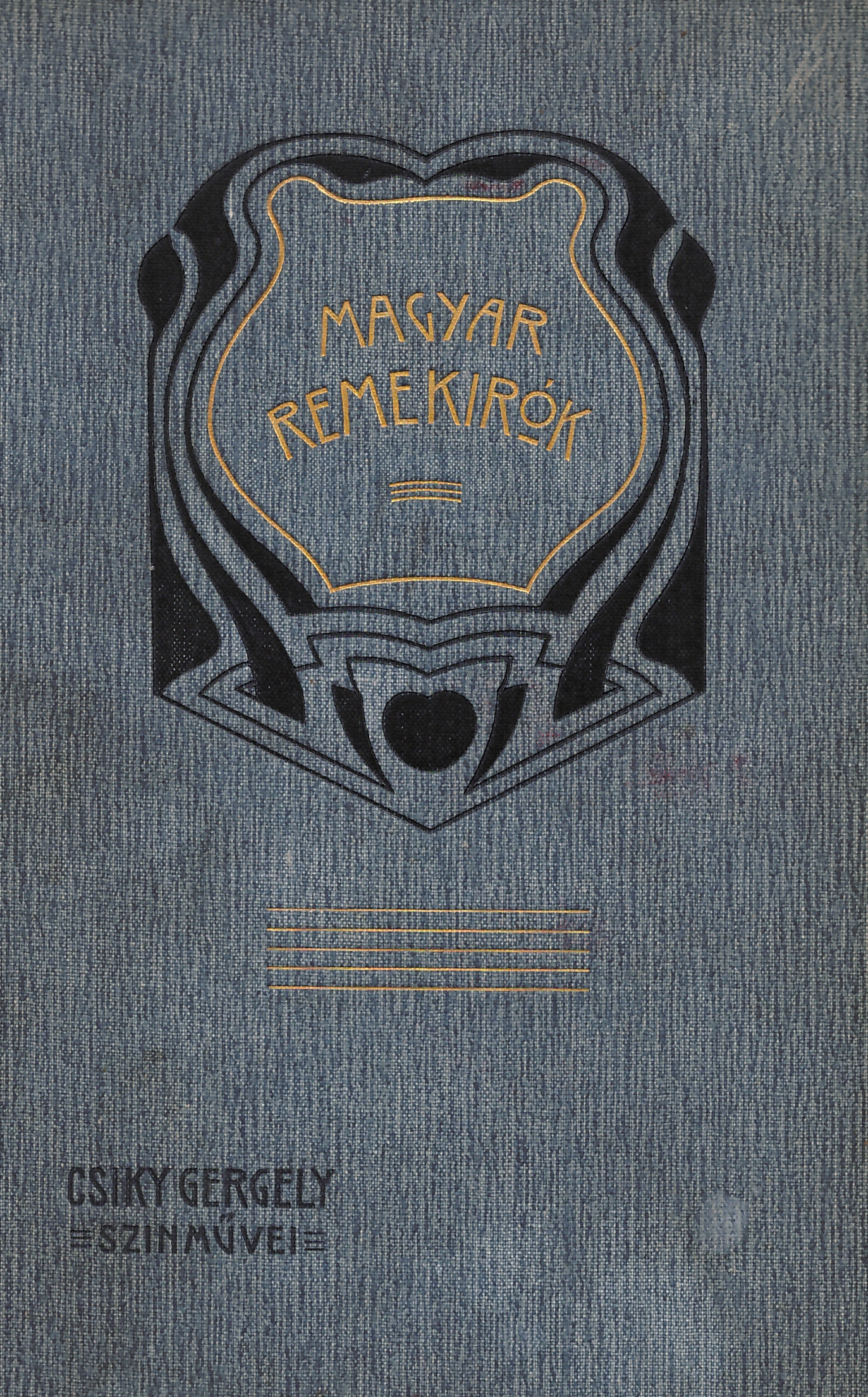 Magyar remekírók borítója (Csíky Gergely [1842-1891]: Színművei 1902-es kiadásához)